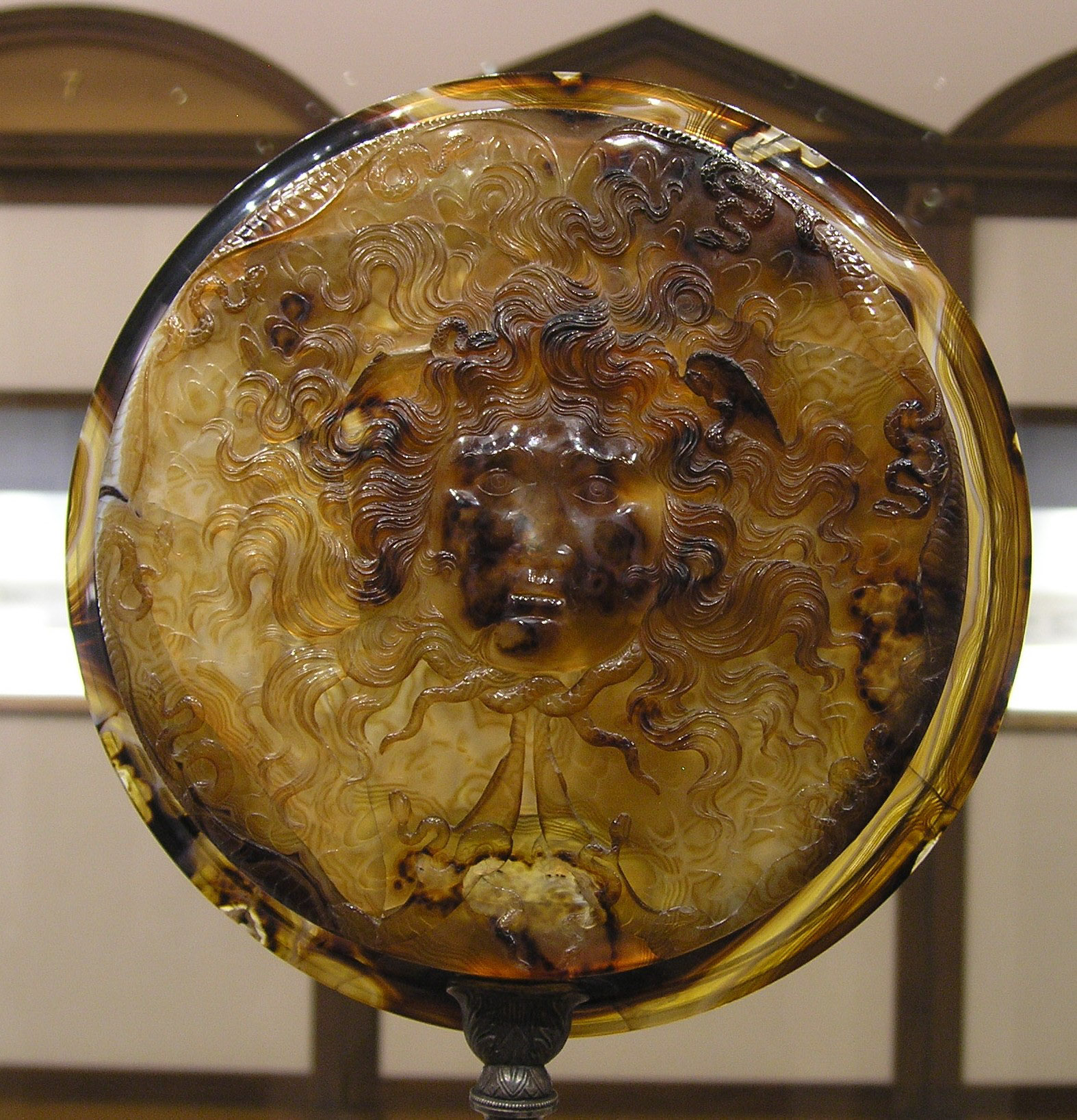 Inside: allegorical scene. Outside:gorgoneion. back view